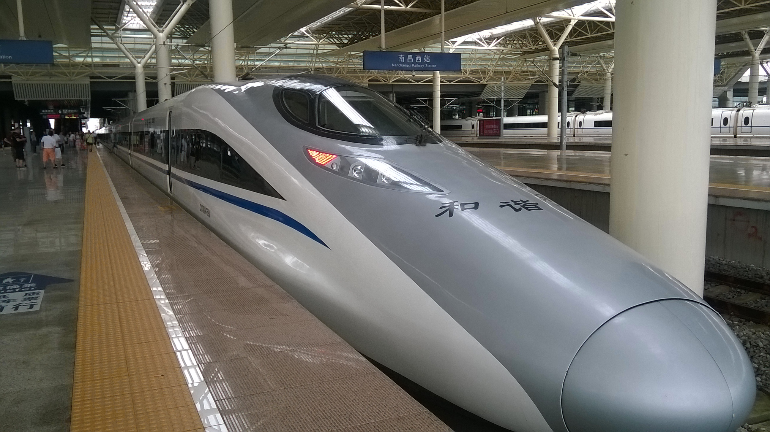 吴语: 南昌个和谐号